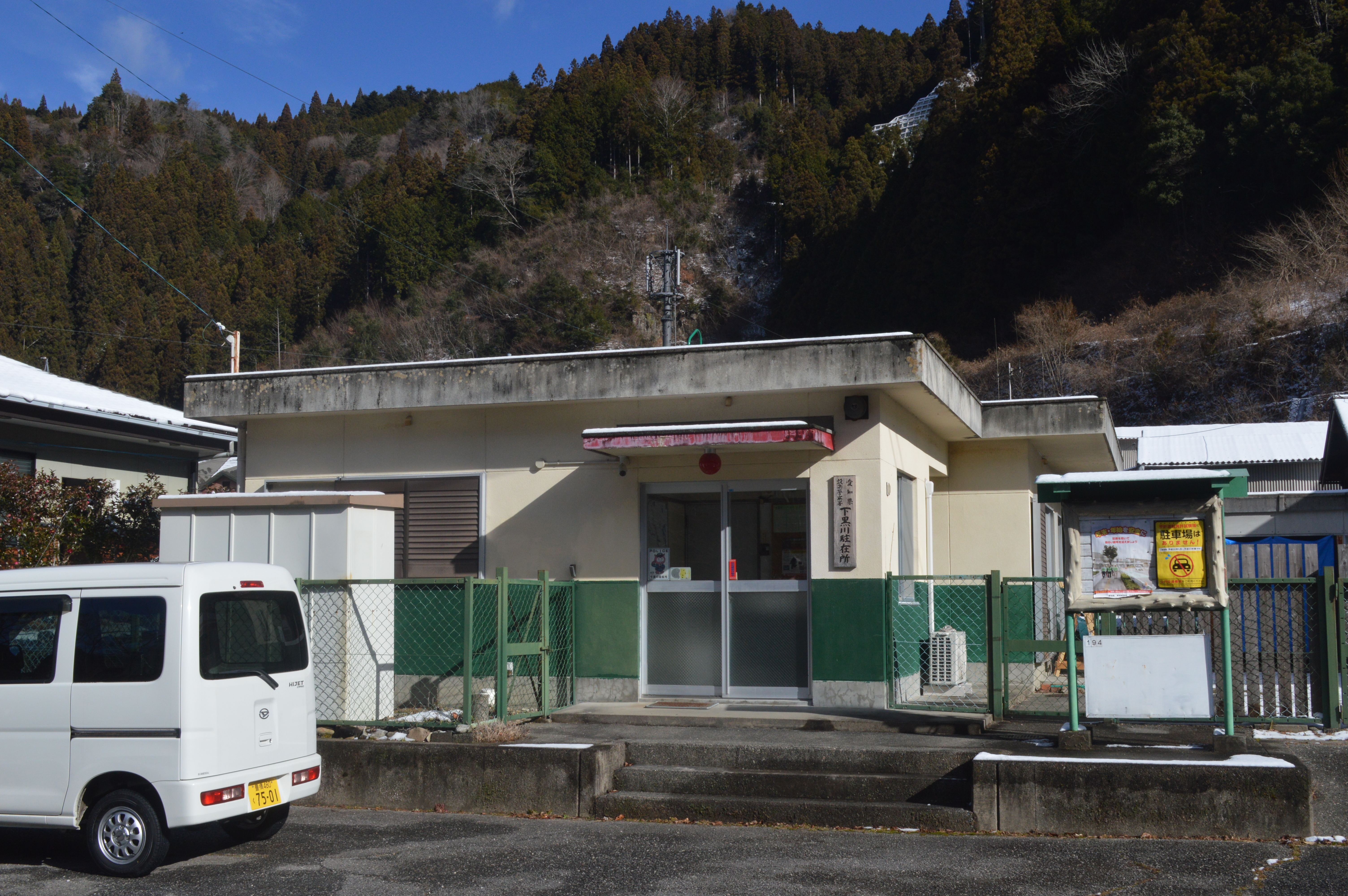 愛知県北設楽郡豊根村の設楽警察署下黒川駐在所。